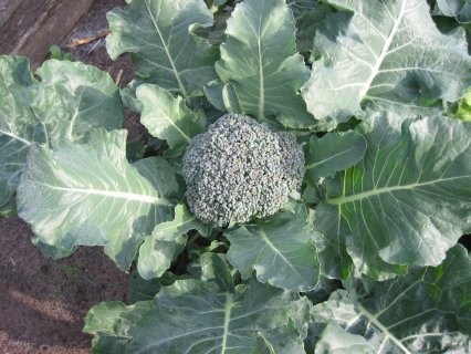 Broccoli